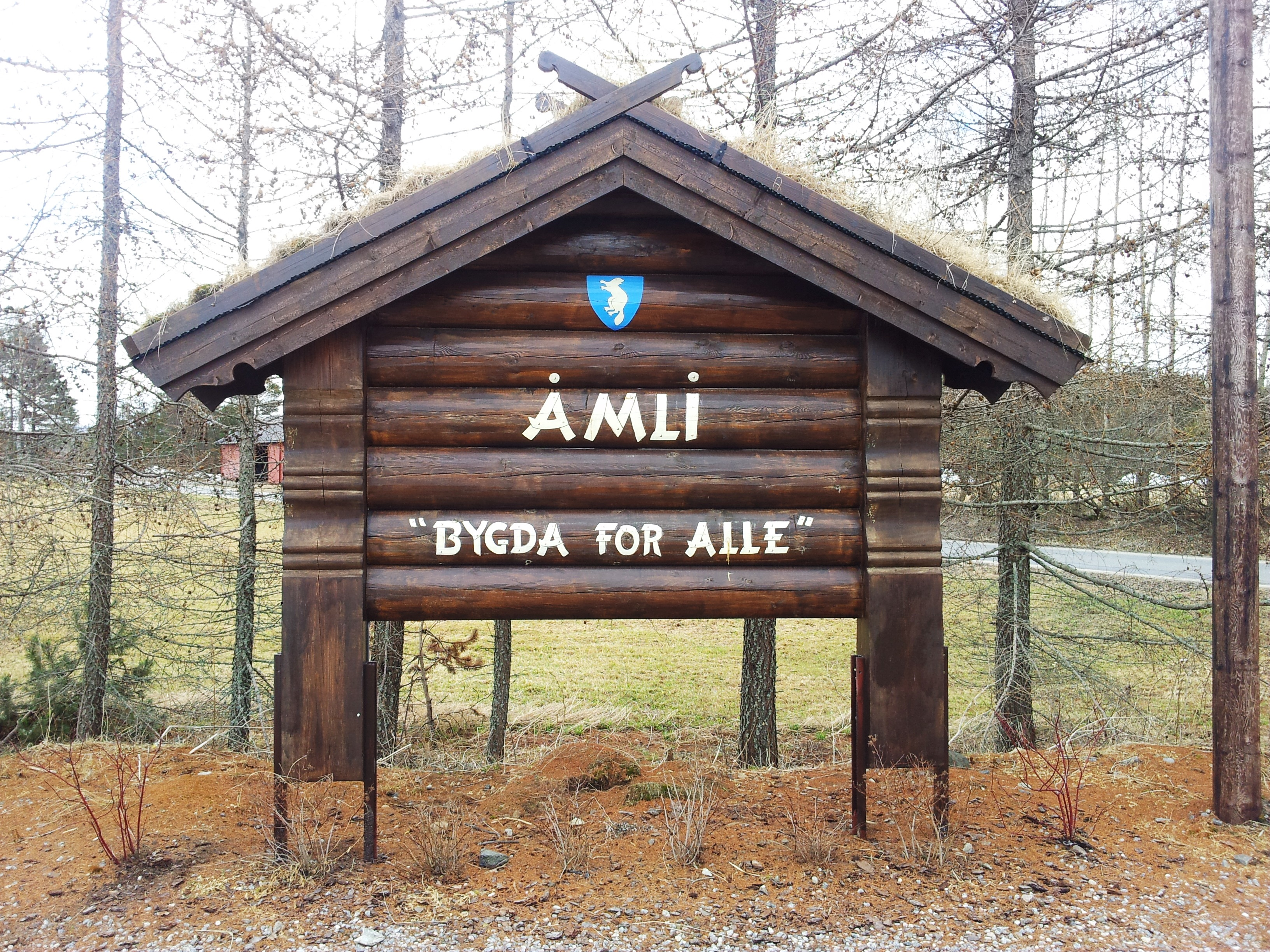 Tavle ved innkjøring til Åmli